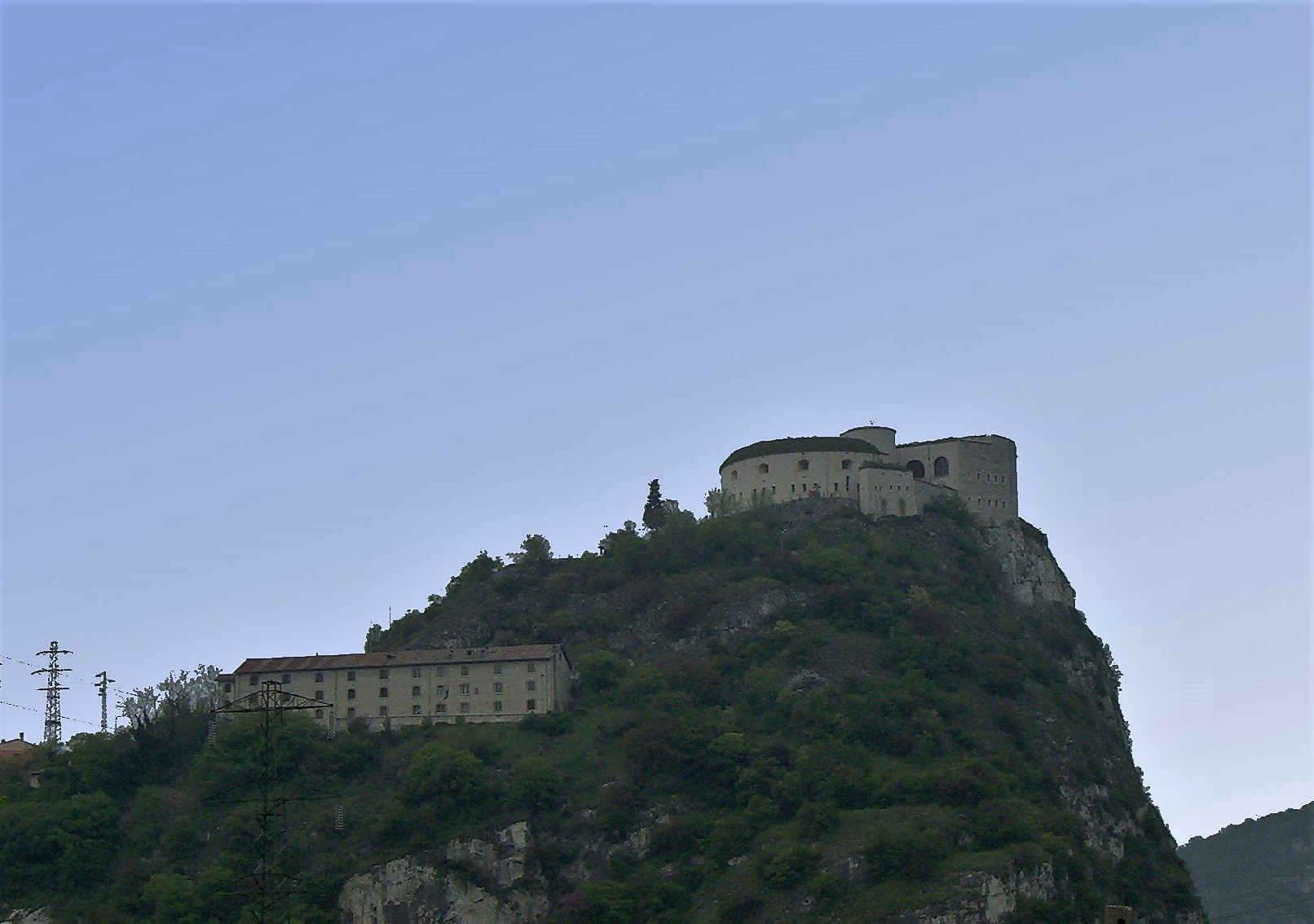 Forte di Rivoli visto dal basso